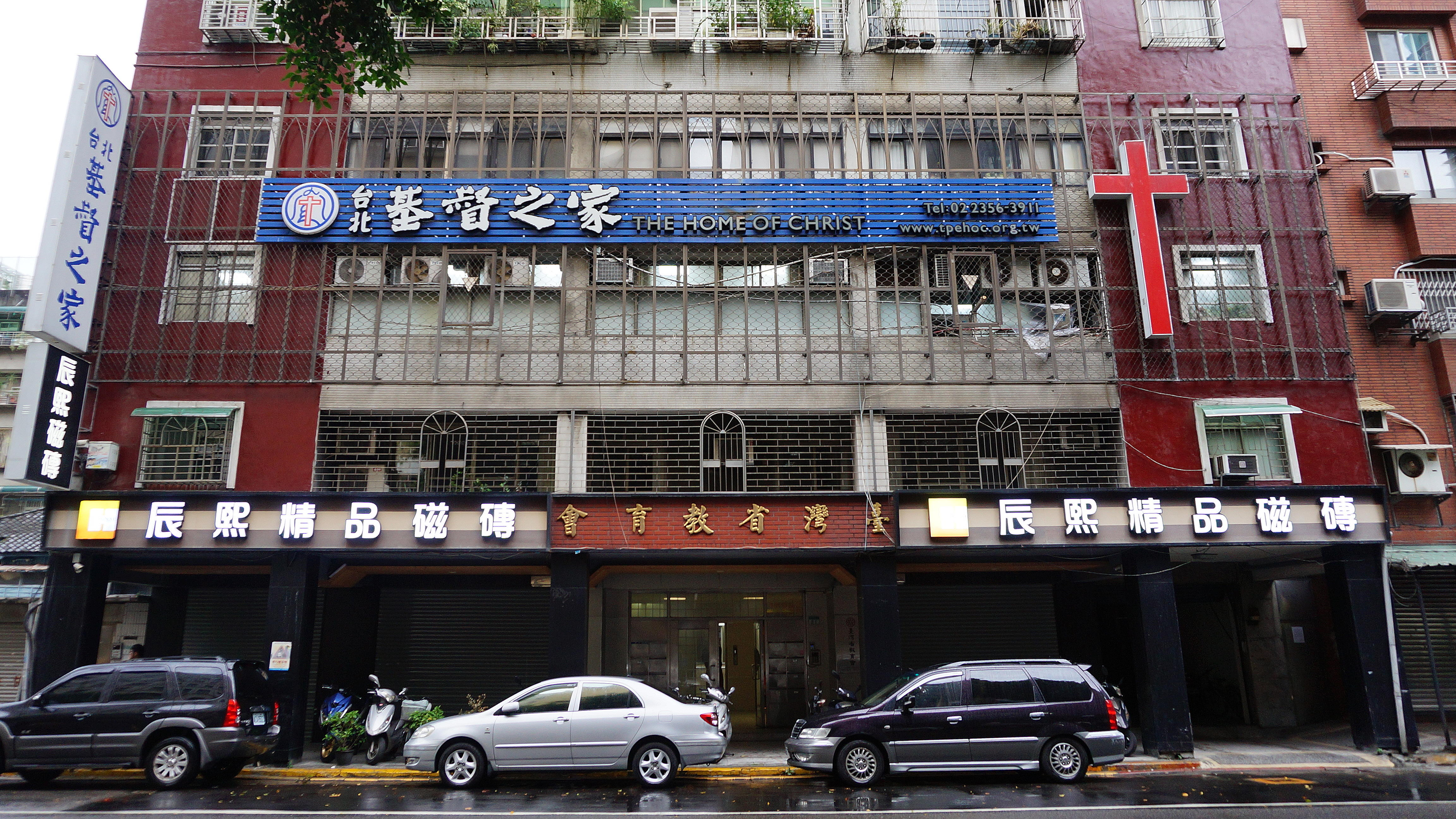 台北基督之家，地址：臺北市中正區青島東路51號3、4樓。